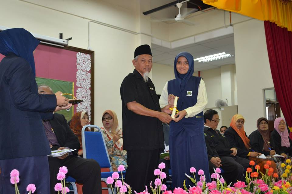 Tokoh NILAM Negeri Melaka 2015